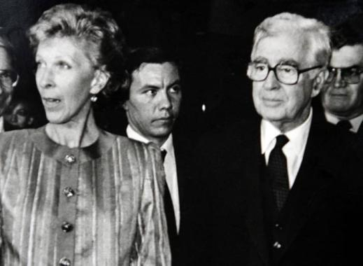 07 DE AGOSTO DE 1990 ENTREGA DEL MANDO PRESIDENCIAL